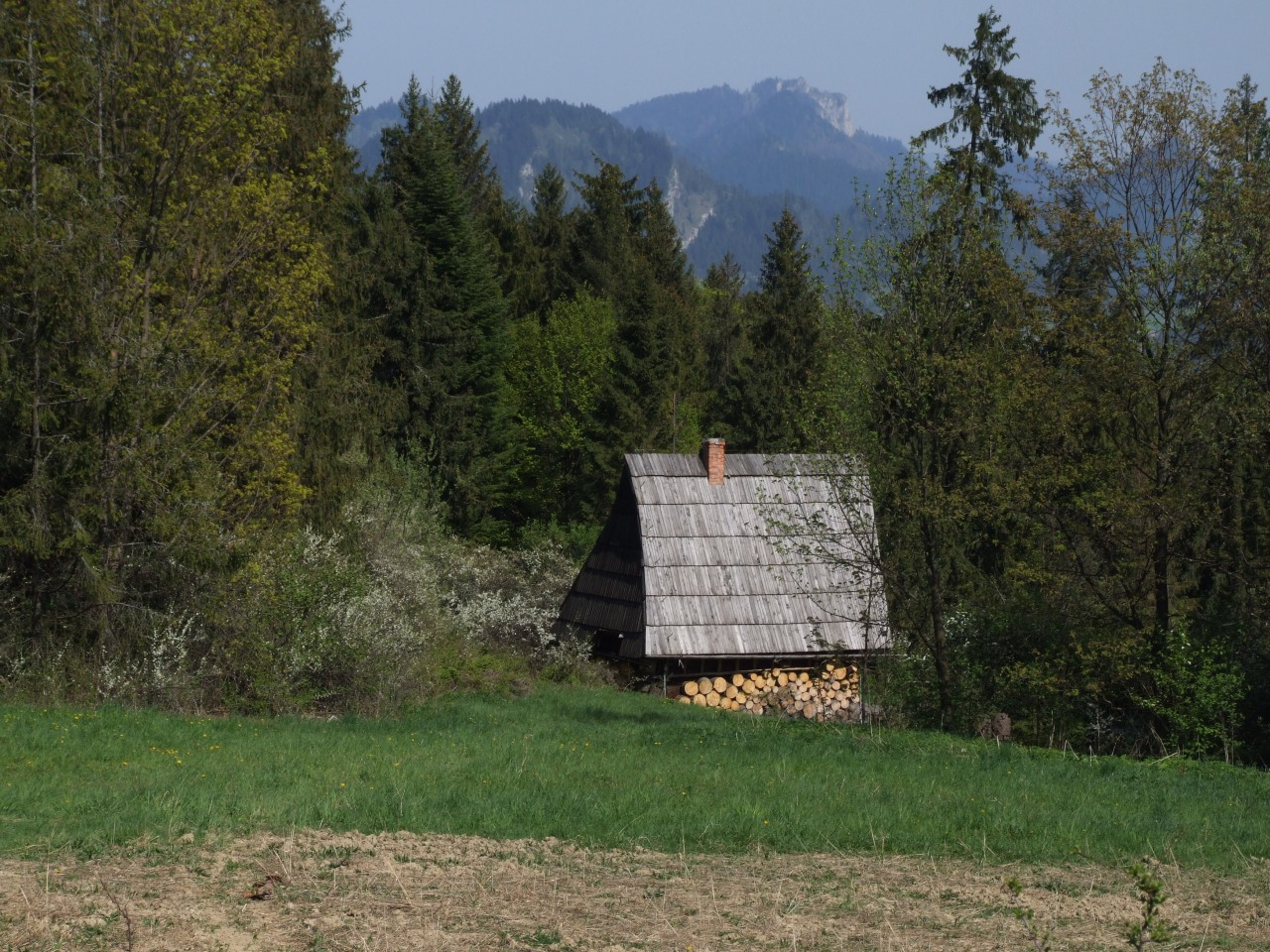 Polana Majerz w Pieninach Spiskich. W głębi Trzy Korony.